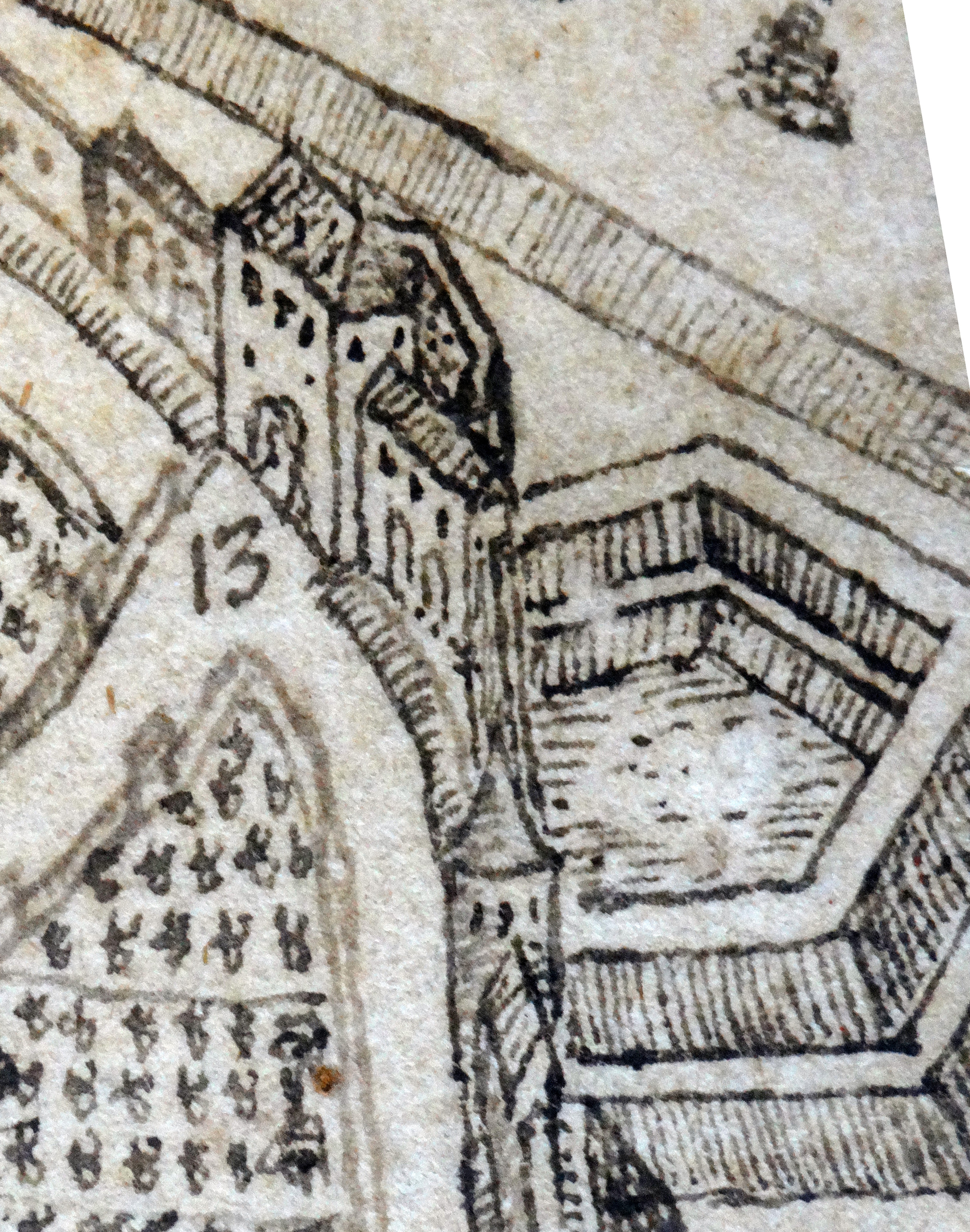 Neuhausenpforte der äußeren Stadtmauer von Worms. Detail aus: Peter Hamman: Statt Wormbß wie selbige 1631 vor dem Schwedischen Ruin der Vorstätt [...] verblieben. Stadtarchiv Worms, Abt. 1B, Nr. 48.